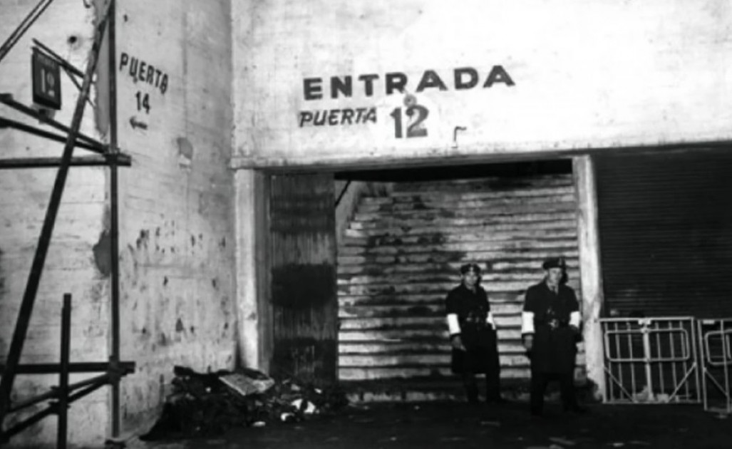 Estadio de River Plate, Buenos Aires, Argentina. La "Puerta 12" al día siguiente de la tragedia en la que murieron 71 personas. 23 de junio de 1968.